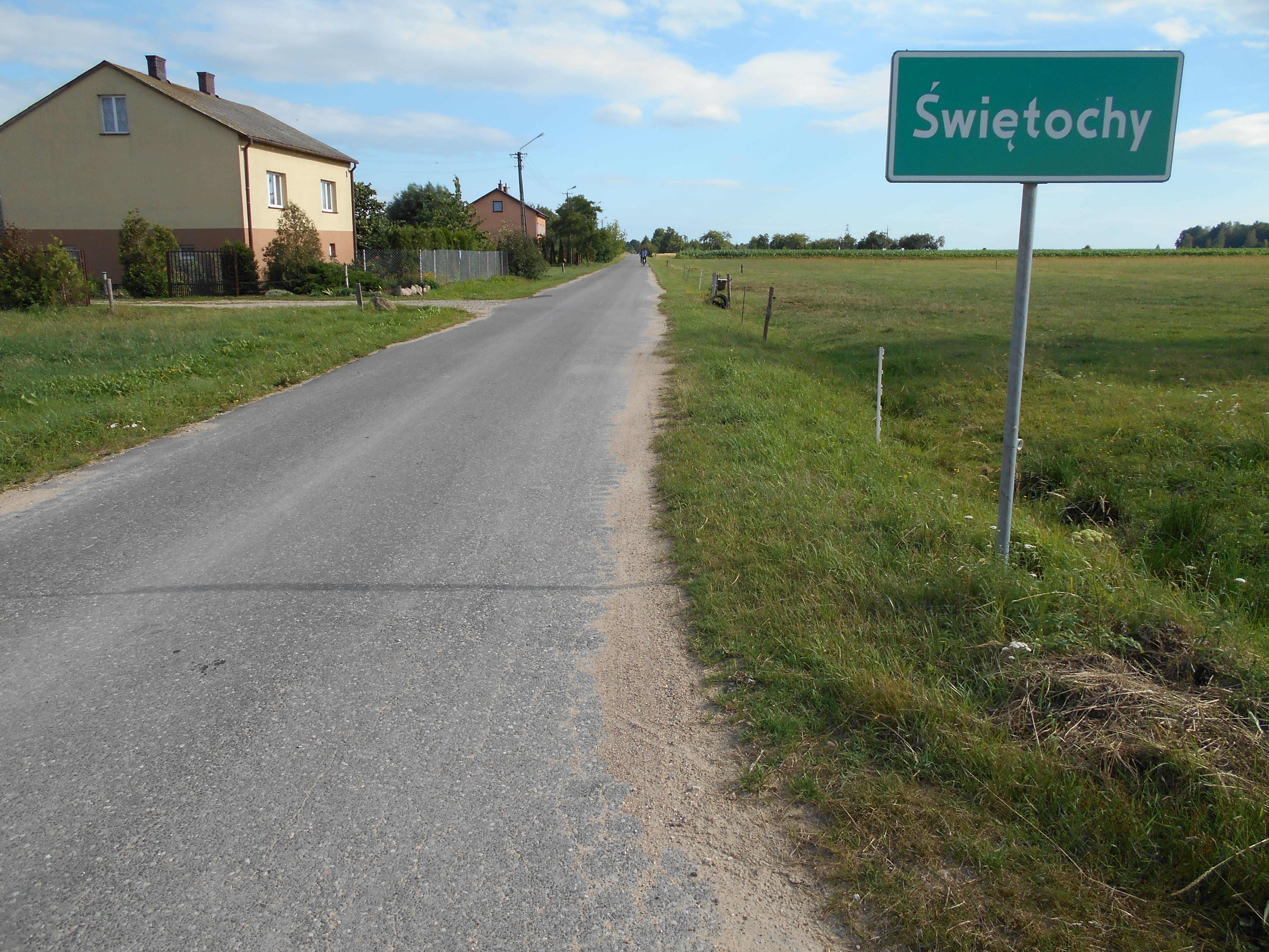 Miejscowość w gminie Siennica